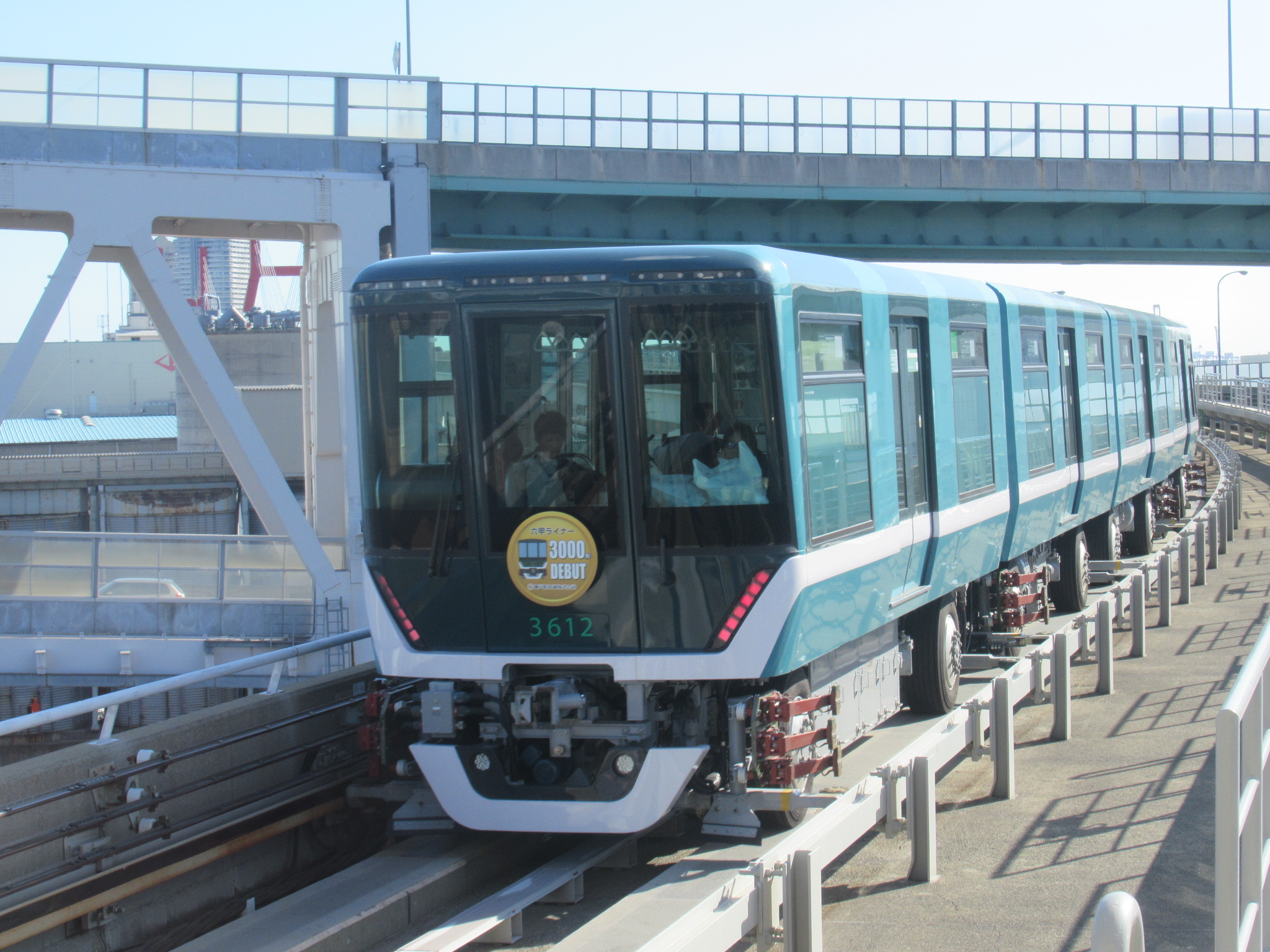 神戸新交通 六甲ライナー3000型 3612F